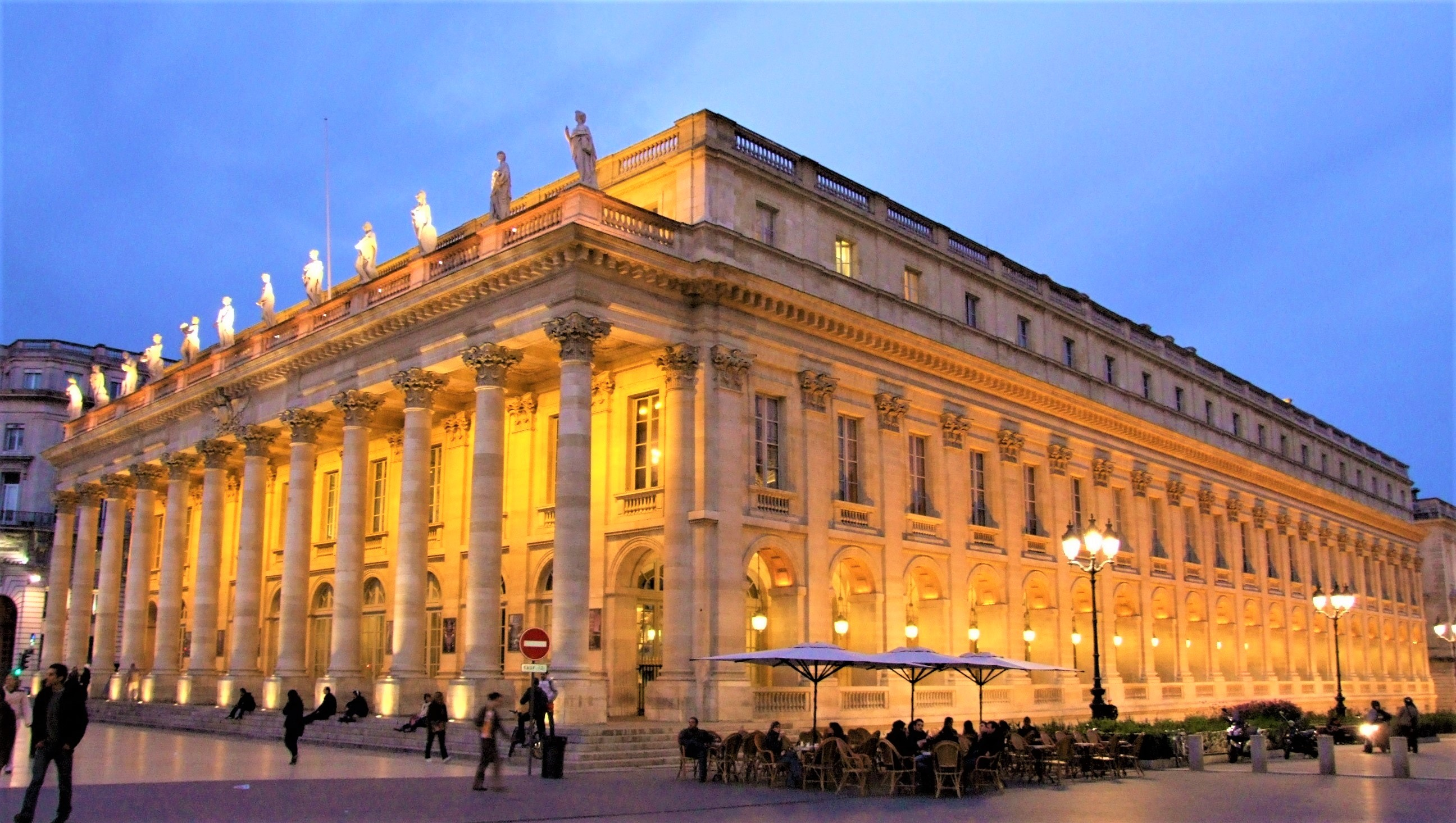 Grand Théâtre, vue de nuit, Bordeaux, Gironde, FRANCE